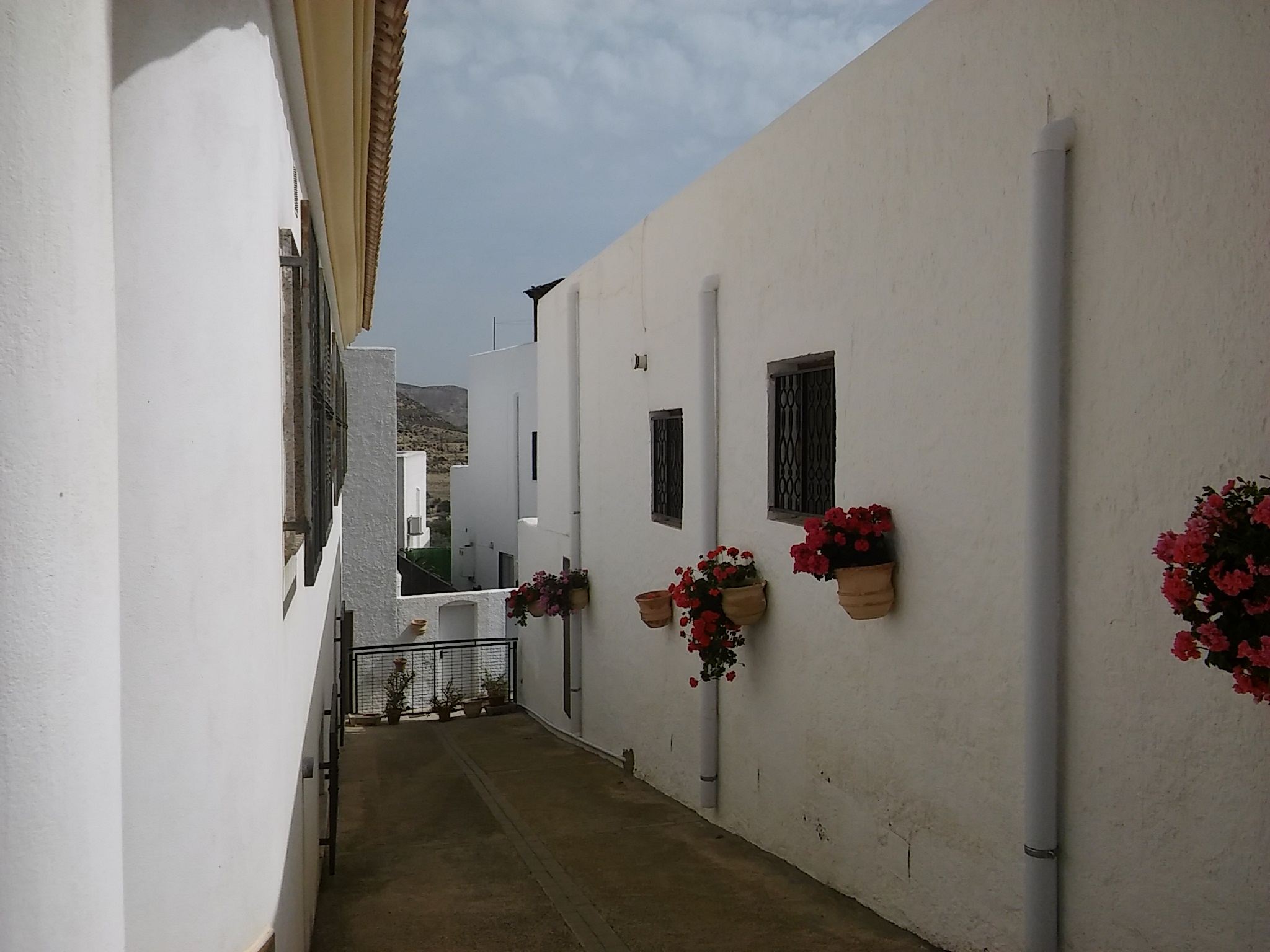 Lucainena de las Torres, Almería. Pueblo de España